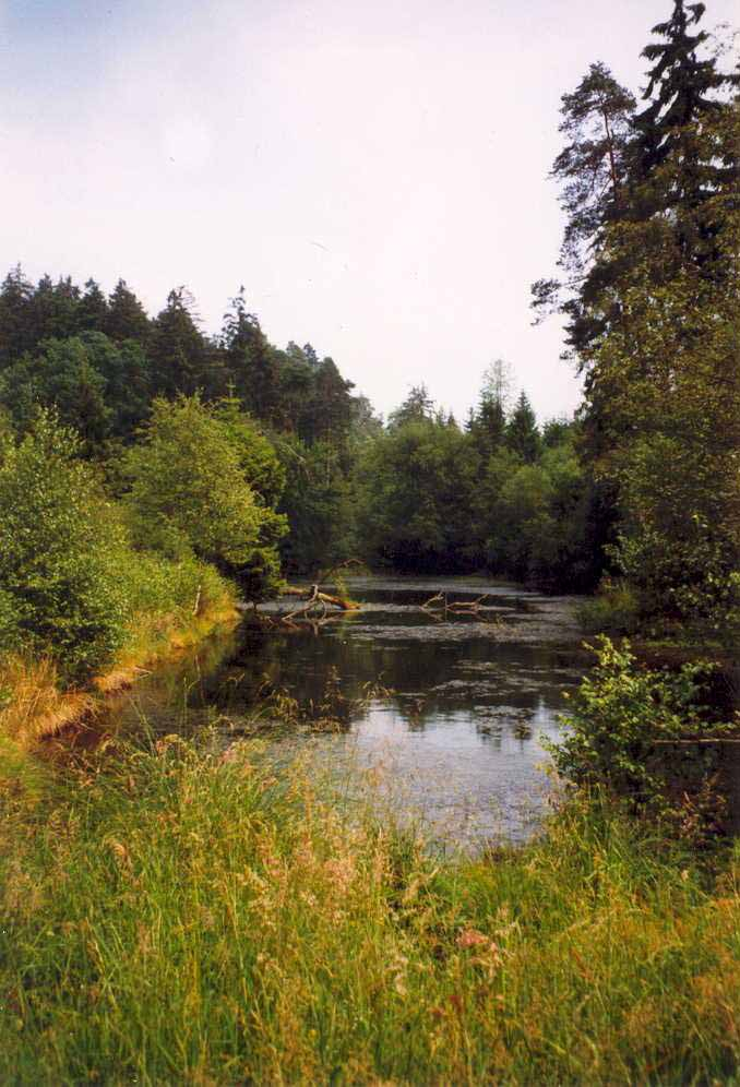 Der westliche Einschnitt der „Alten Eisenbahn“; geschützter Landschaftsbestandteil 2.4.25 „Geologischer Aufschluss Alte Eisenbahn“ in Lichtenau (Gemarkung Kleinenberg), Kreis Paderborn